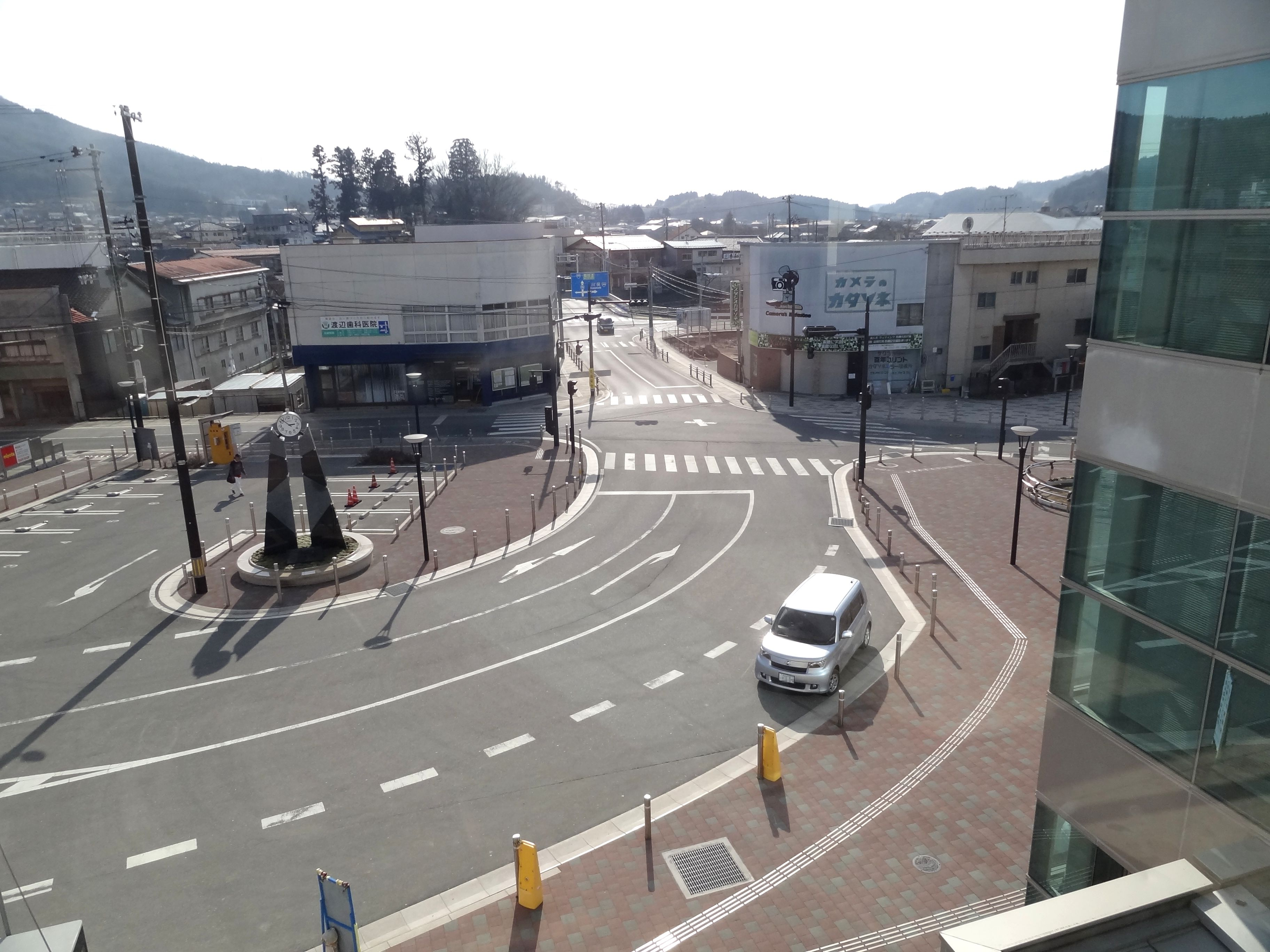 船引駅前ロータリー